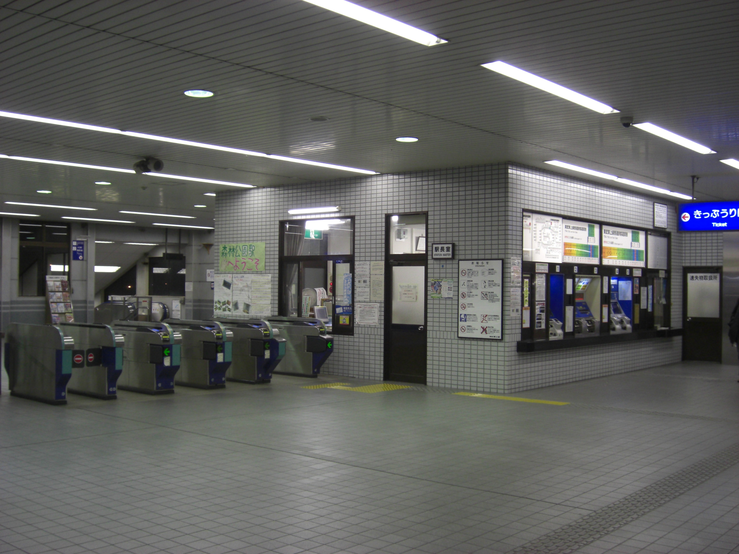 東武森林公園駅 改札